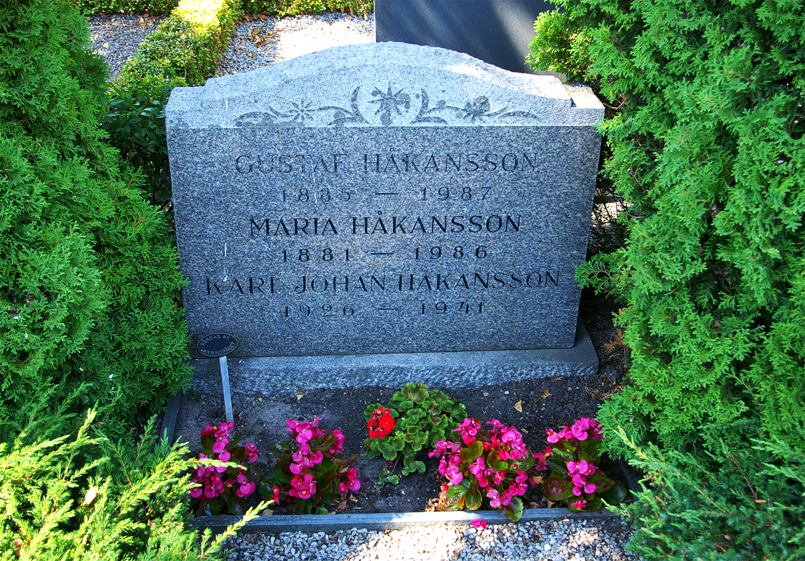 Cyklisten Stålfarfars gravsten på Kvistofta kyrkogård i Skåne, Sverige.